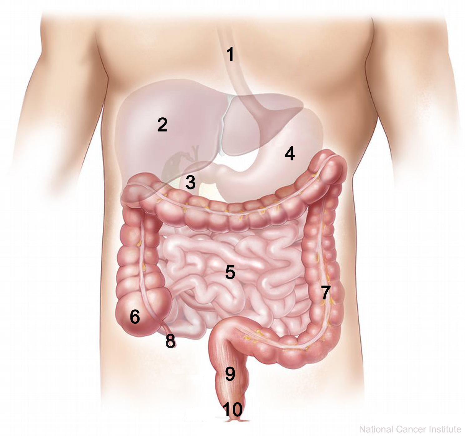 système digestif